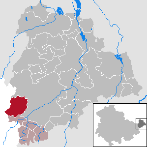 Löbichau in Thuringia - District Altenburger Land